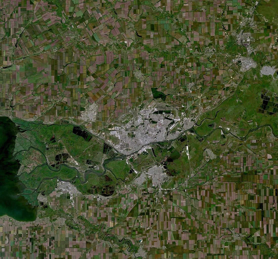 Космический снимок города Ростов-на-Дону с близлежащими к нему территориями